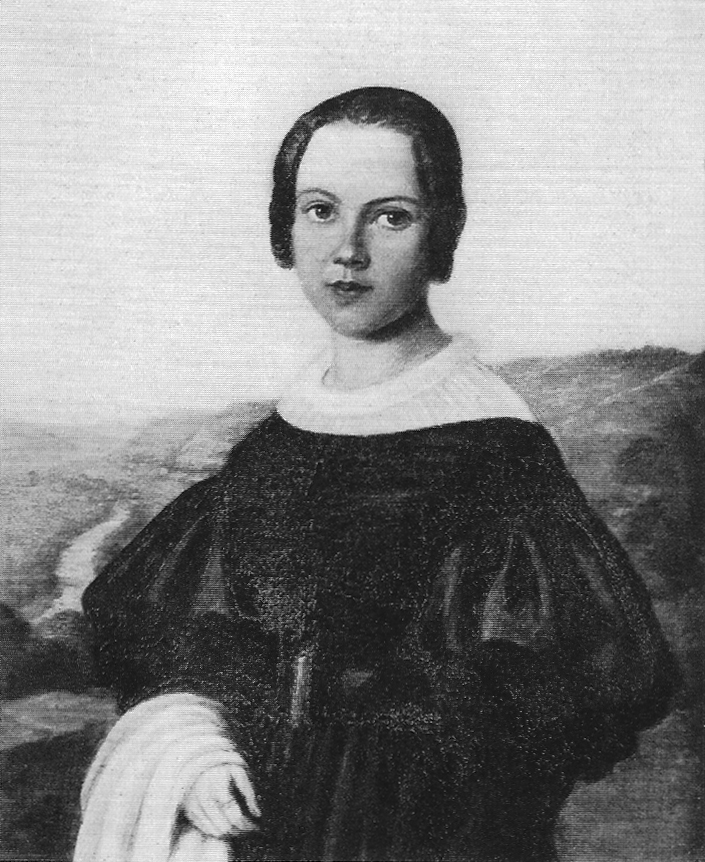 Wilhelmine Bossert, später verheiratete Palmer (Öl auf Leinwand)